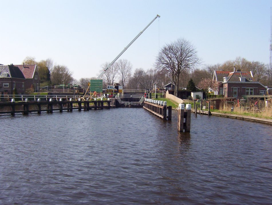 De Waaiersluis in de Hollandsche IJssel bij Gouda, tijdens de bouw van een gemaal in de spuisluis. Eigen foto, gebruik vrij. Categorie:Afbeelding Gouda